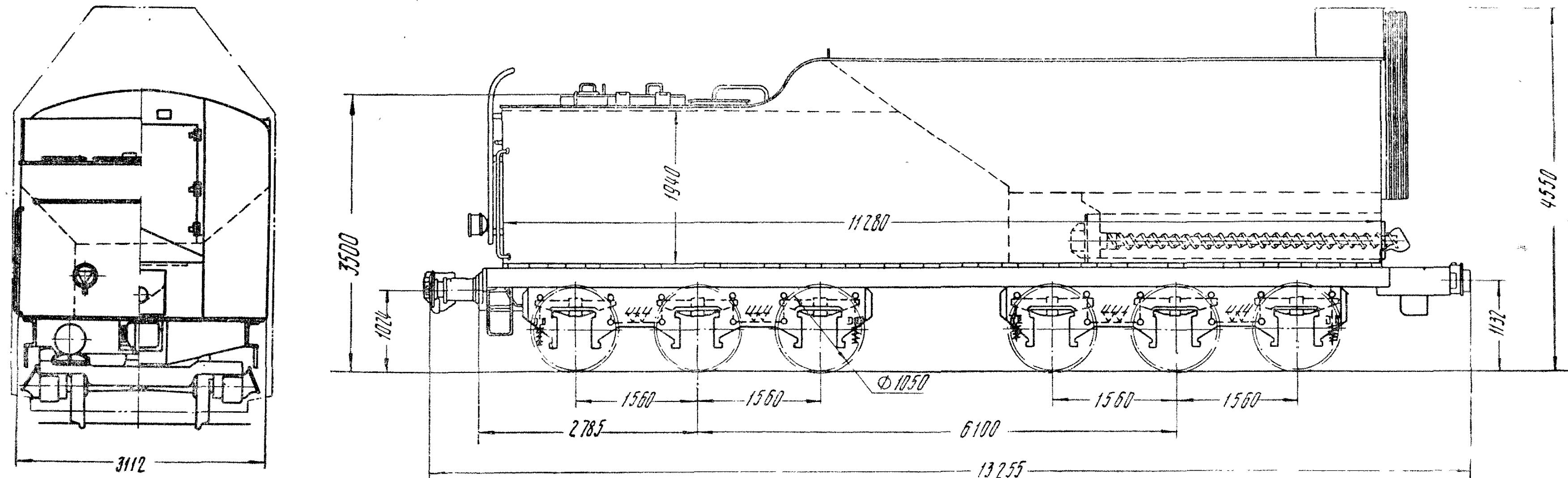 Основные размеры тендера П58 (прицеплялся к паровозам ЛВ, П36,ОР21